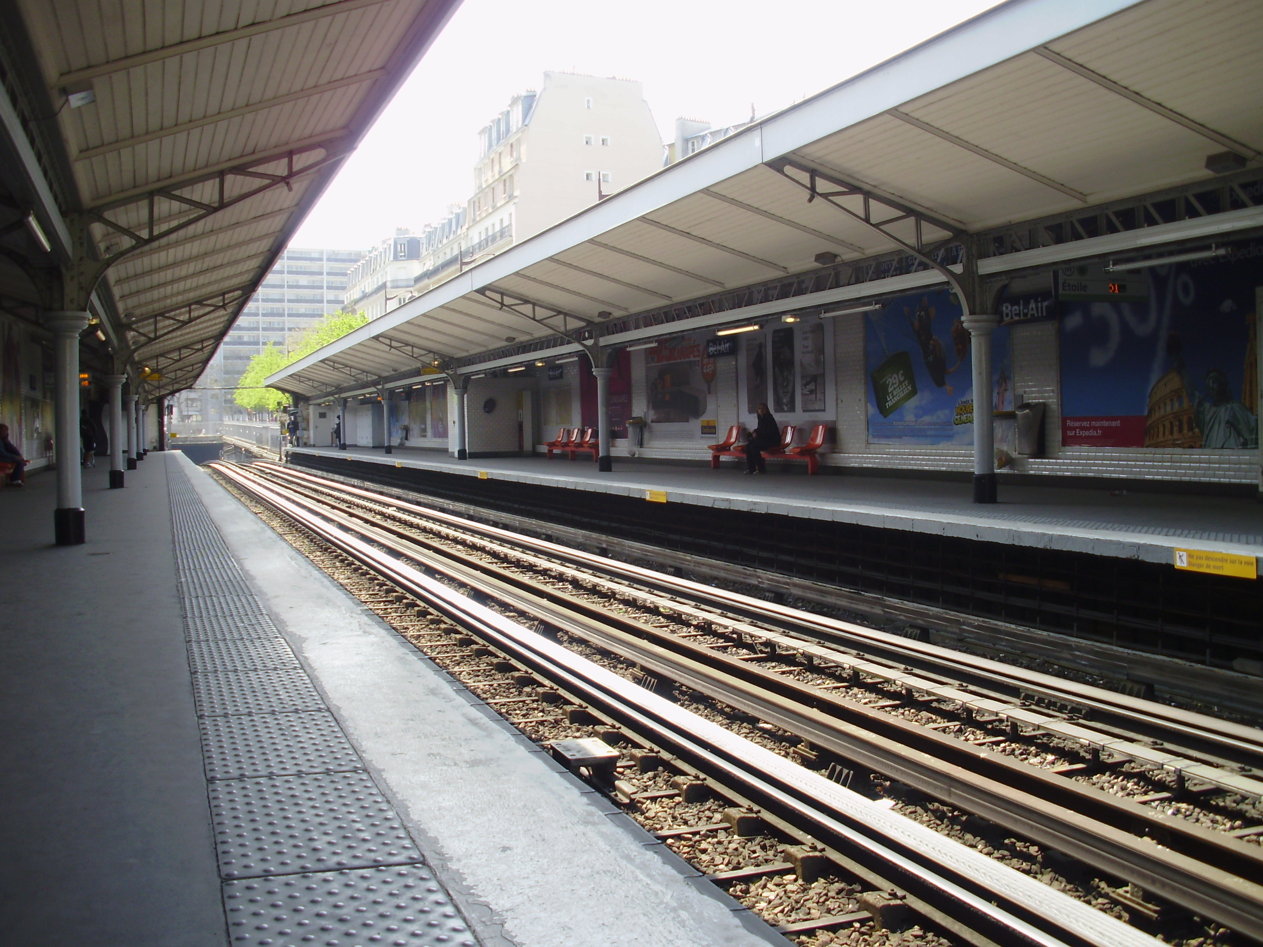 Quais de la station Bel-Air du métro de Paris.